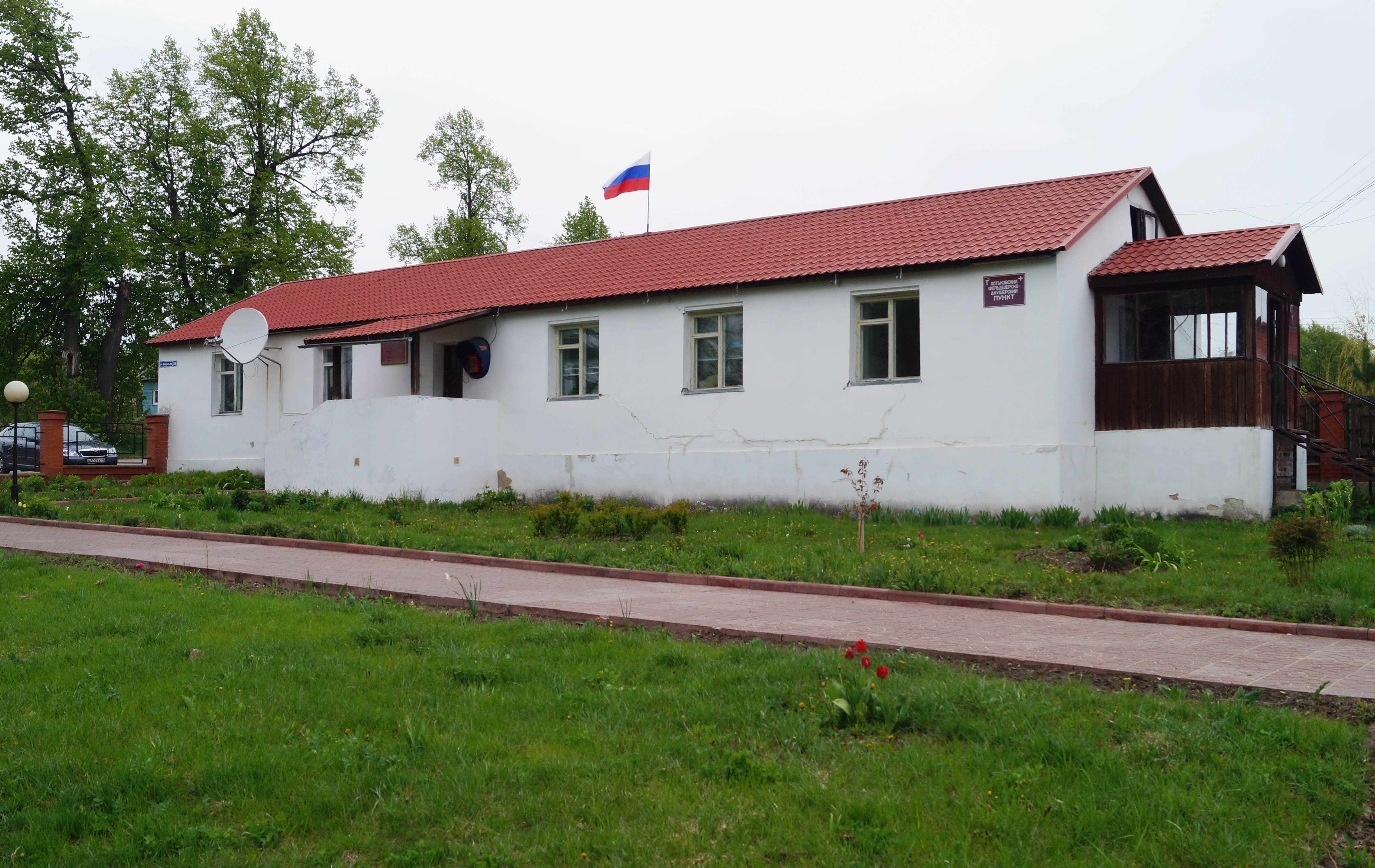 Хотьково (Думиничский район), сельская администрация